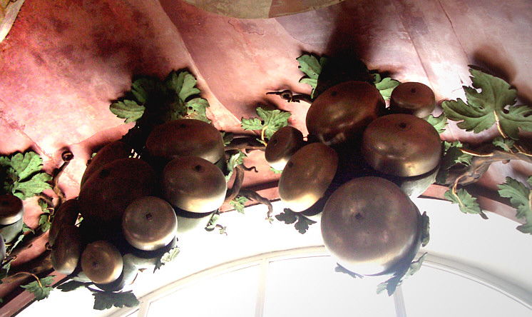 Weingarten, Große Orgel (Gablerorgel), Pedalglocken